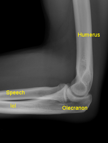 *Sujet:Ielebougelenk vun der Säit op enger Röntgenfoto